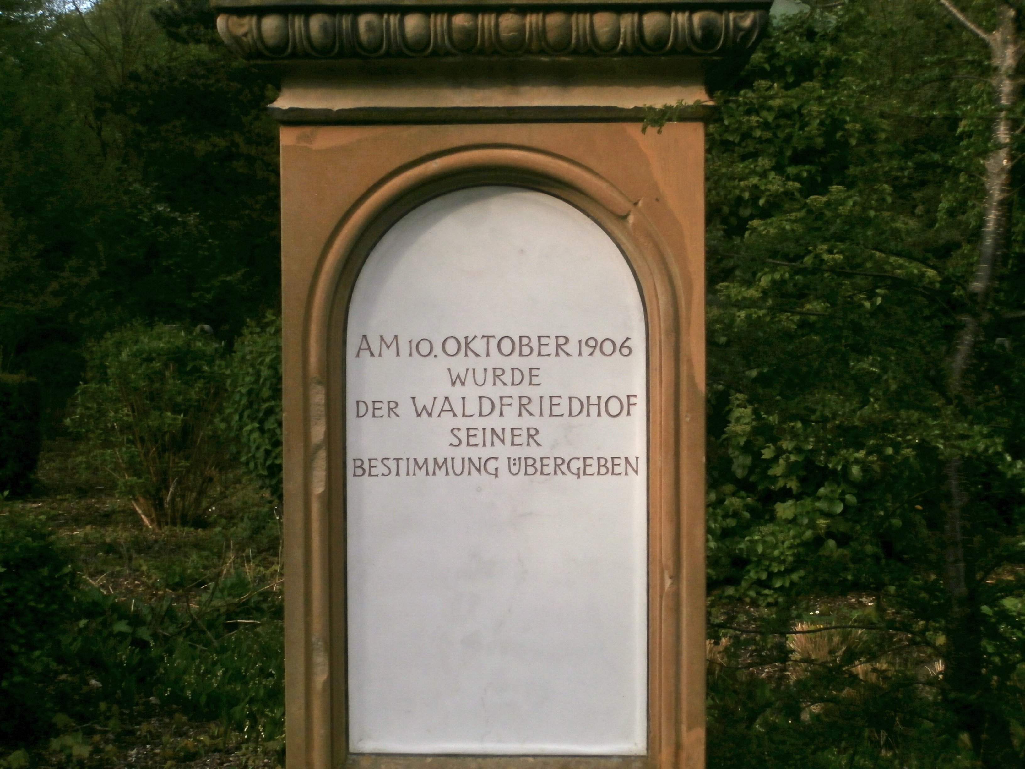 Eingangshinweis des Gerresheimer Waldfriedhofs